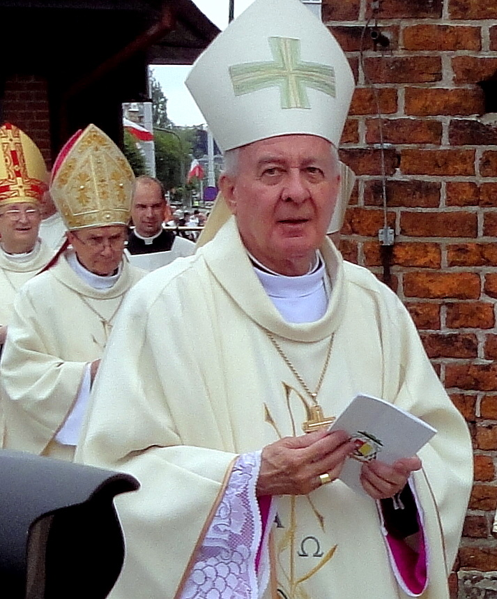 W Gorzowie Wlkp. w 2012 r